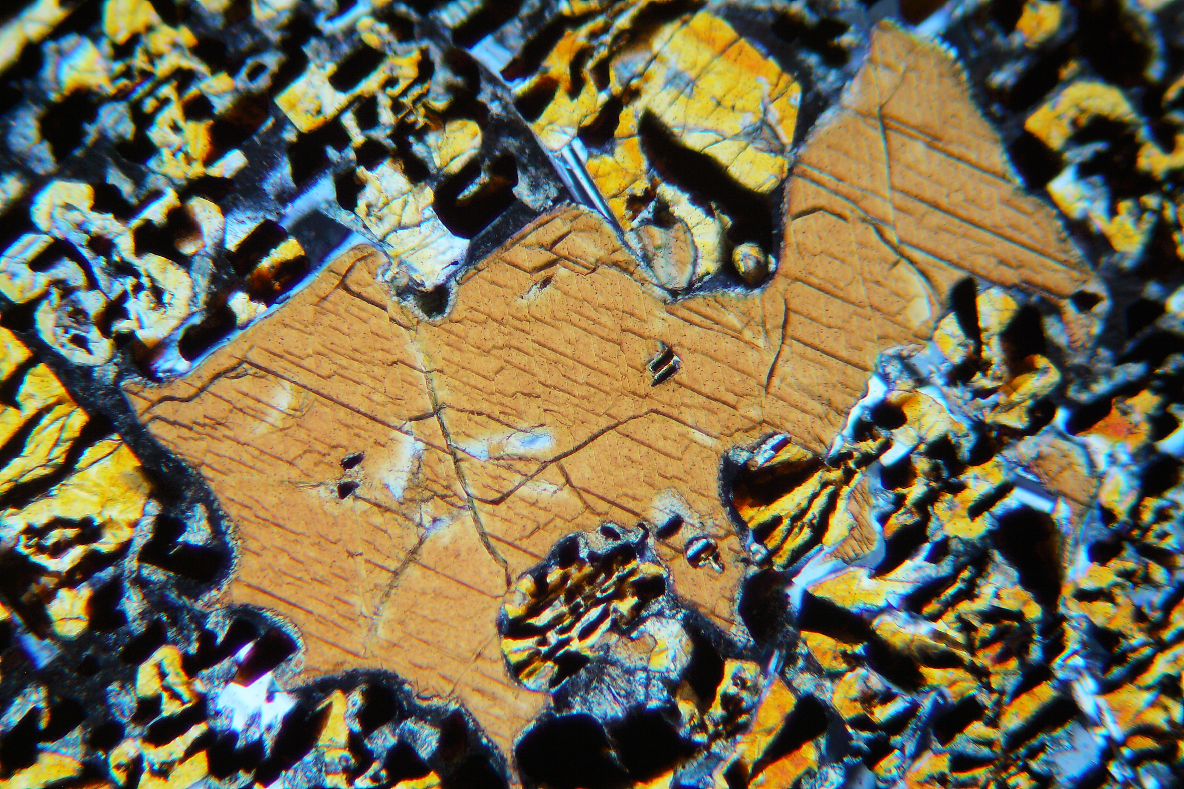 Reliktische Hornblende in einem opacitisierten Hornblendekristall, XPL